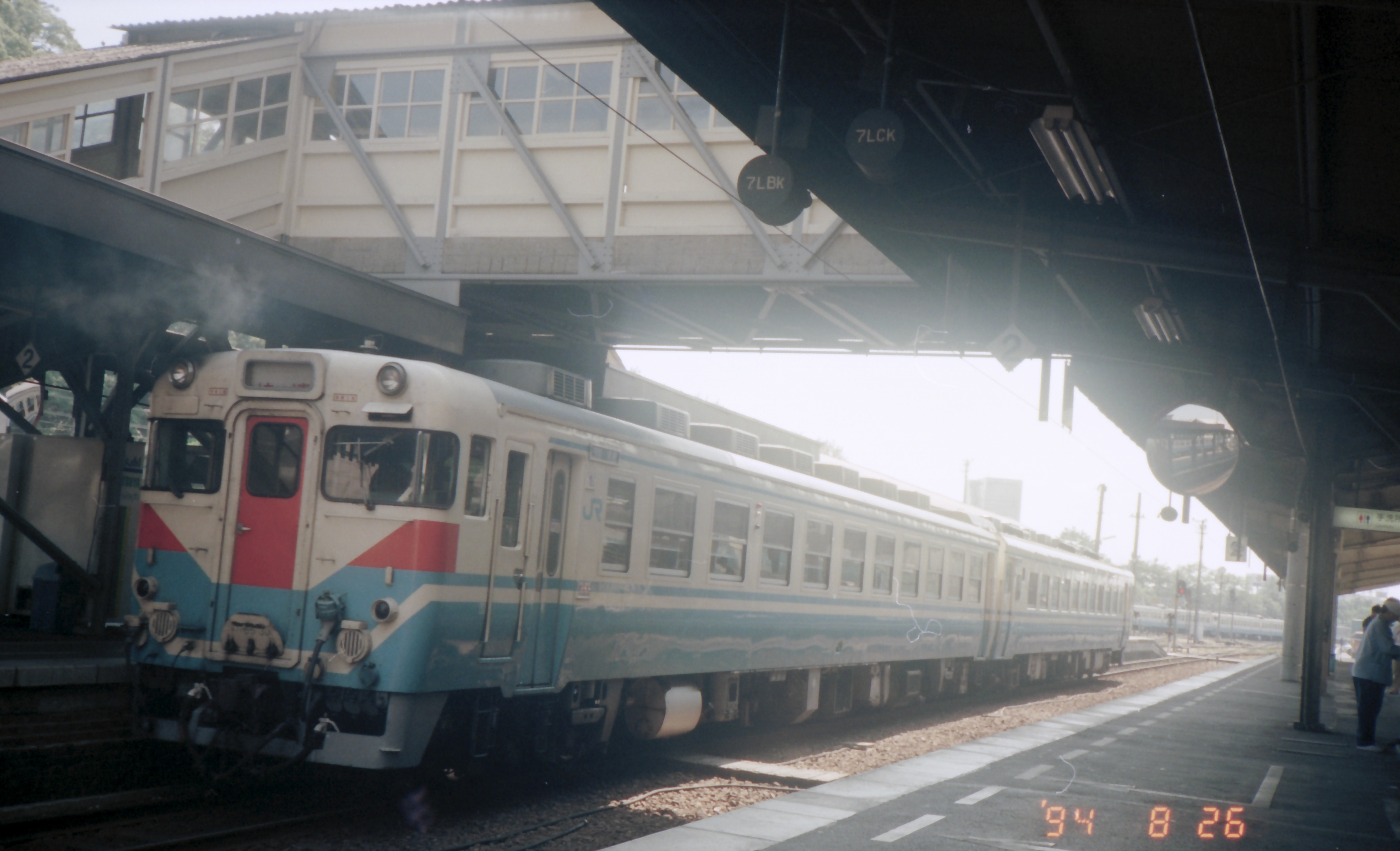 四国のキハ65型試験塗装